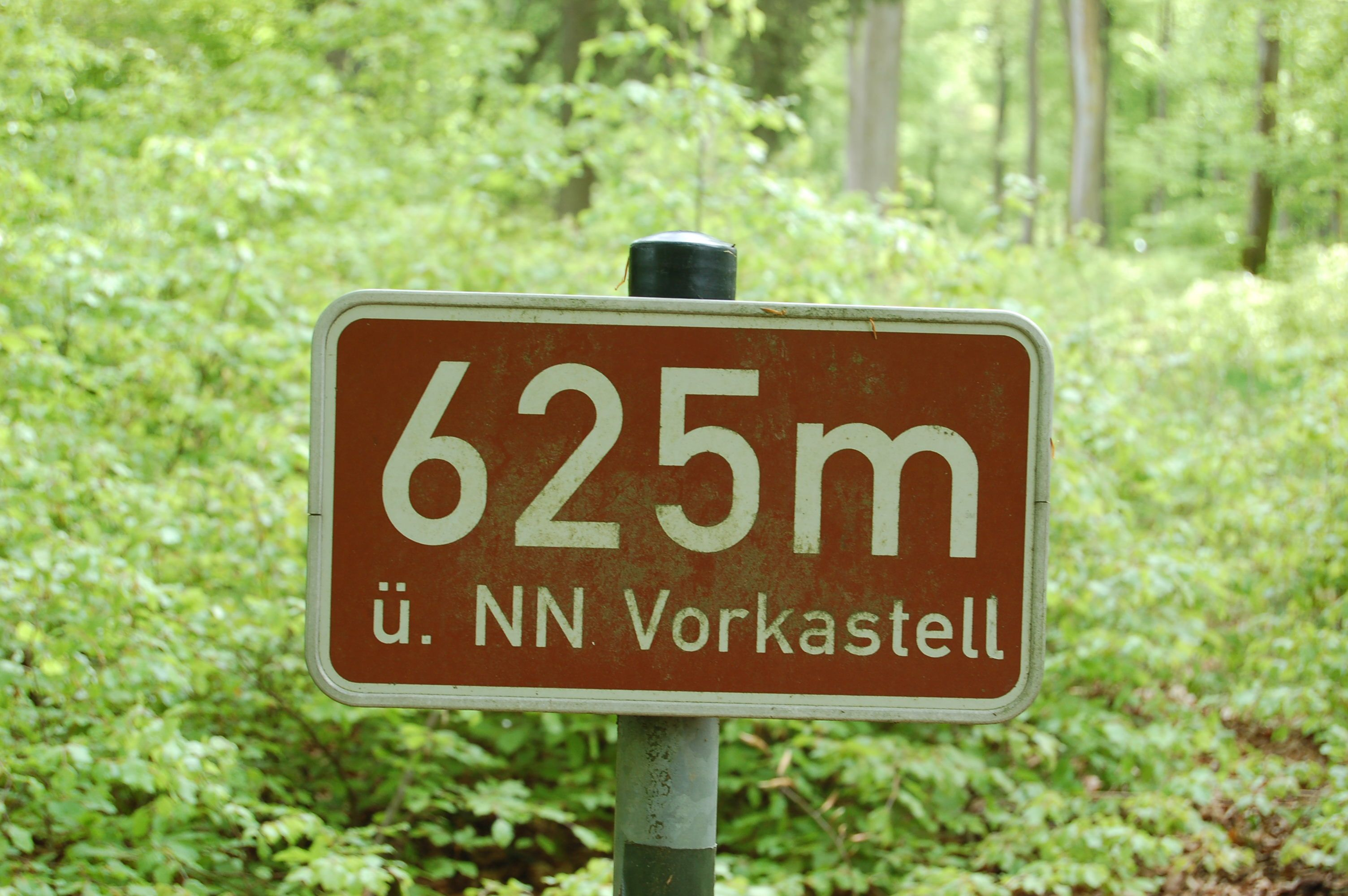 Höhentafel Vorkastell 625 m über NN, Gemeindegebiet Buhlenberg in Rheinland-Pfalz.